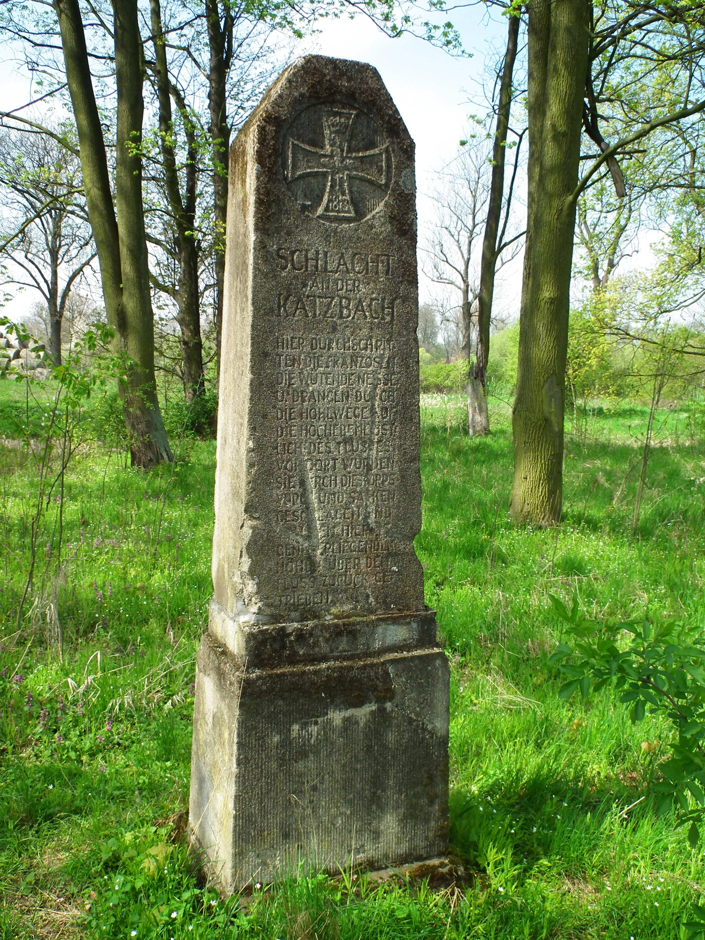 Pomnik Bitwy nad Kaczawą w Krajowie.